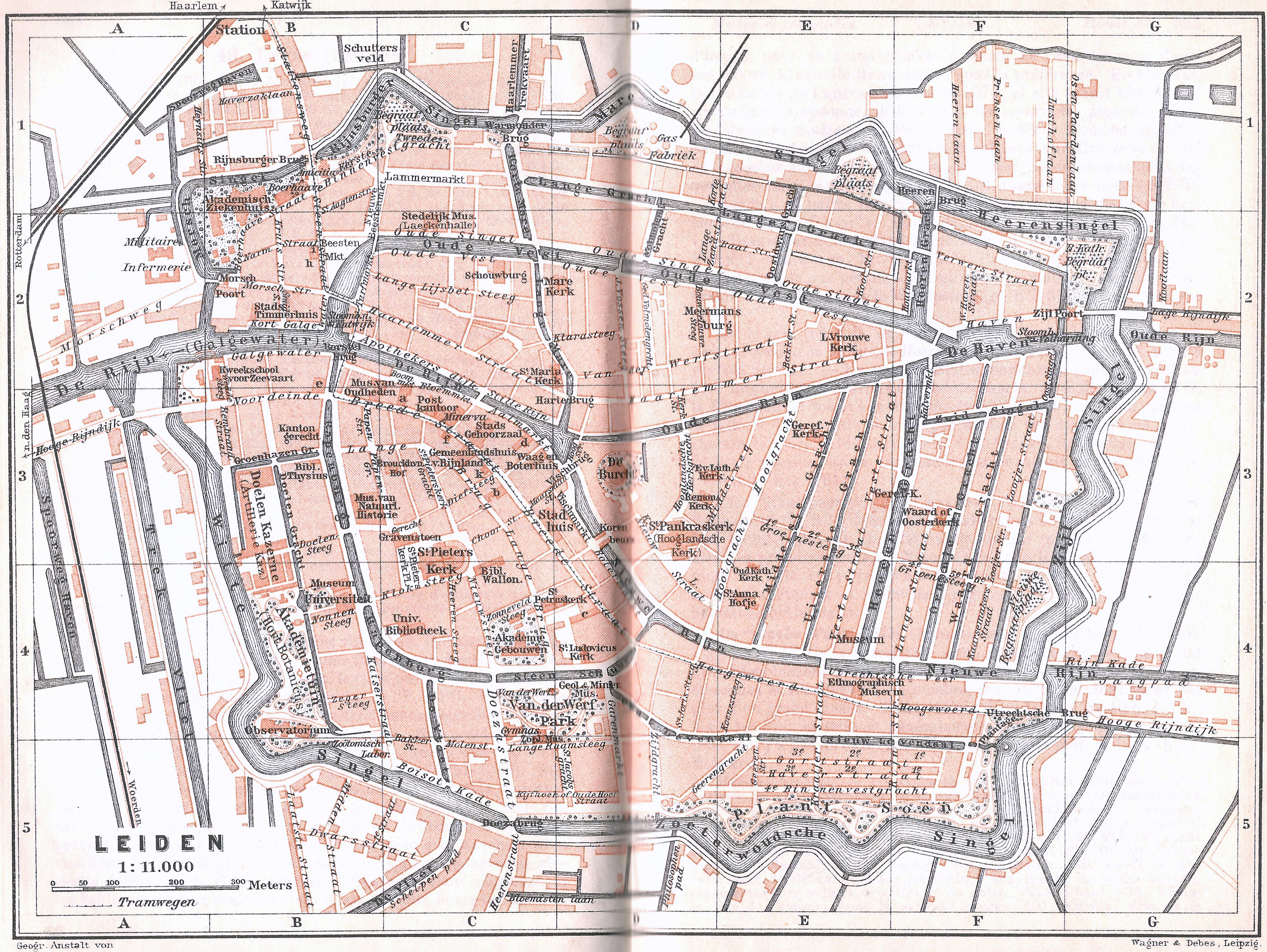 Kaart van Leiden uit de Baedeker reisgids van 1905